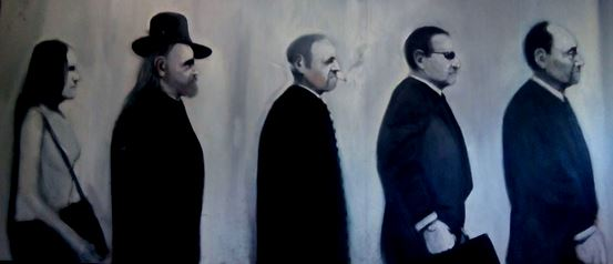 Último cuadro pintado por Antoni Ferrer Carné